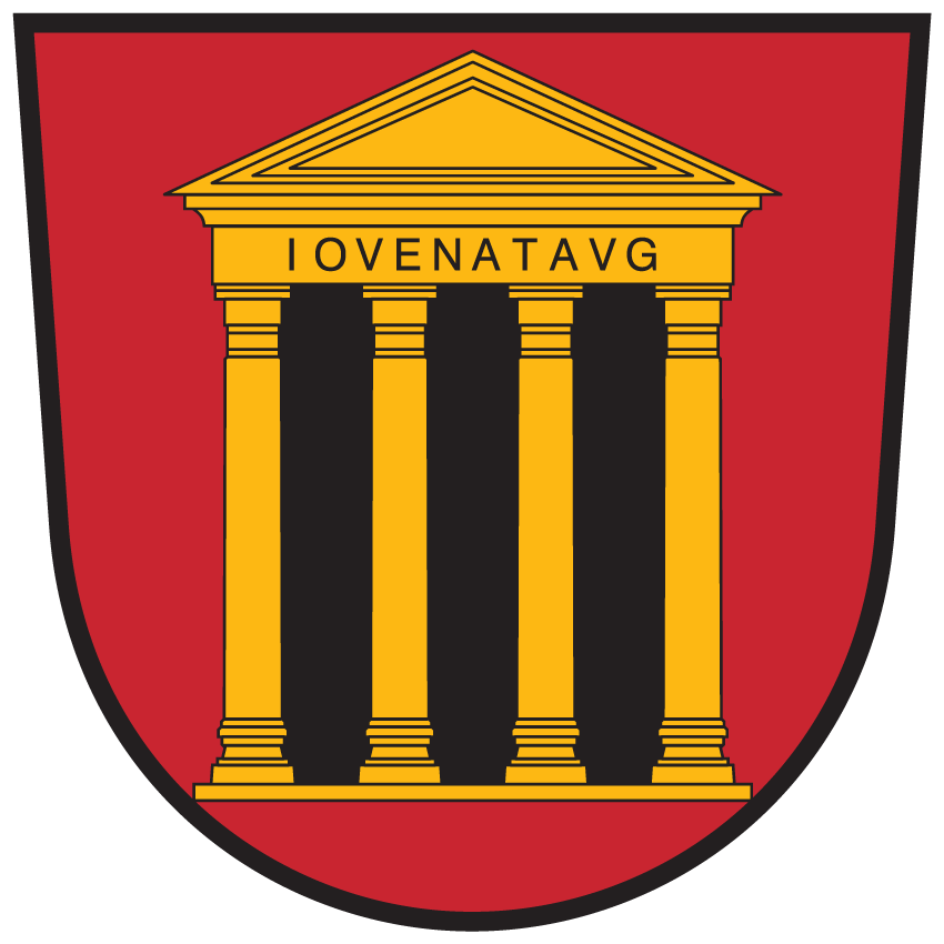 Wappen von Globasnitz